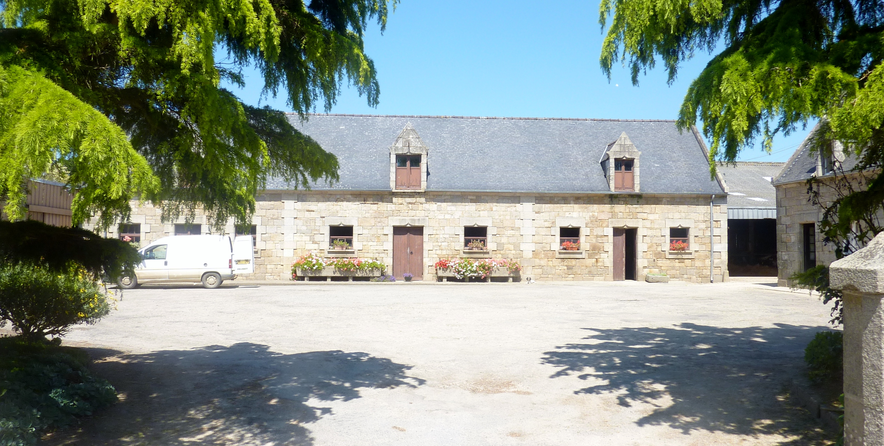 Saint-Pol-de-Léon : la ferme-modèle de Gourveau, située face à l'entrée du château de Kernévez, construite au début du XIXe siècle par Sylvestre Budes de Guébriant.